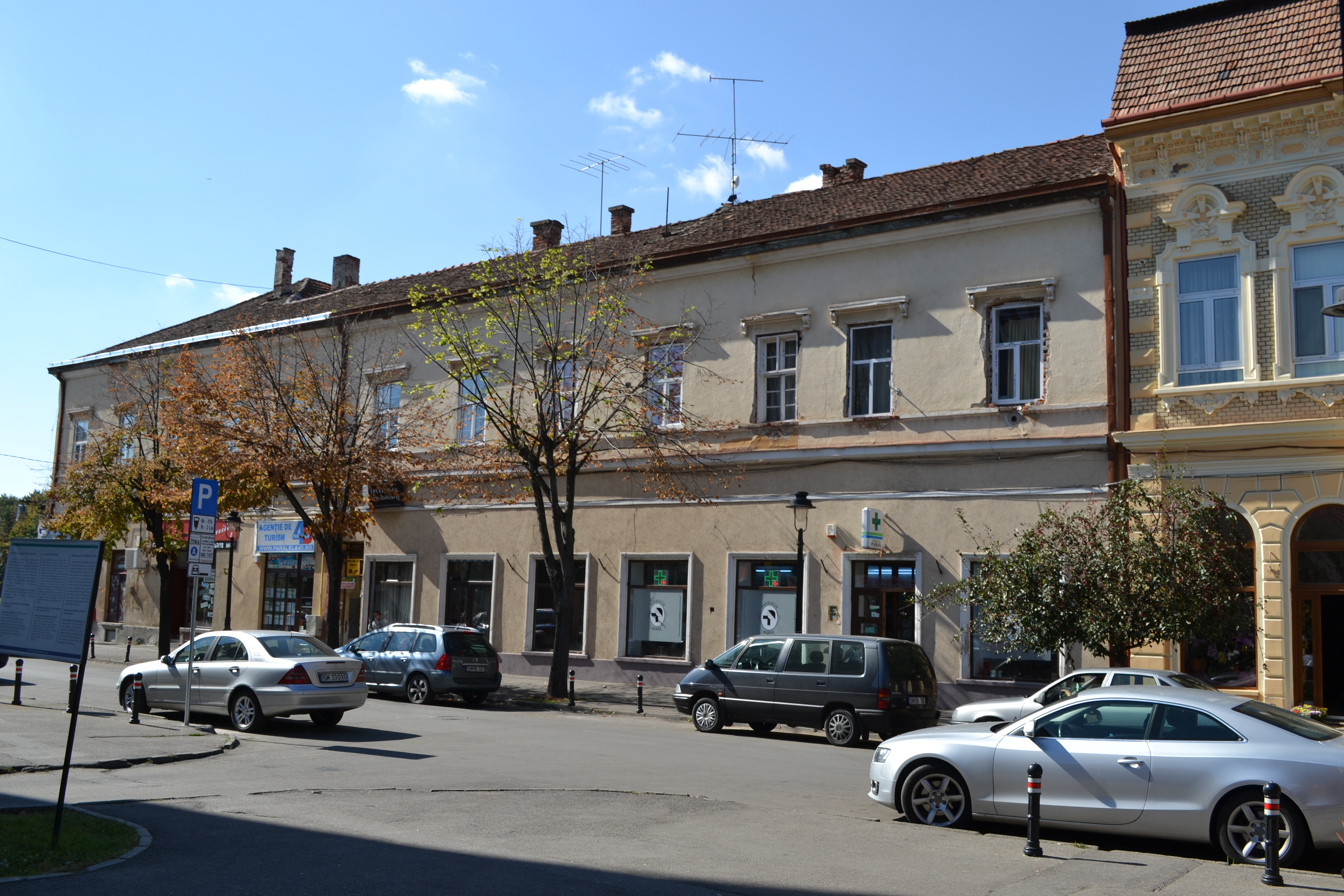 Casa Ormos Satu Mare